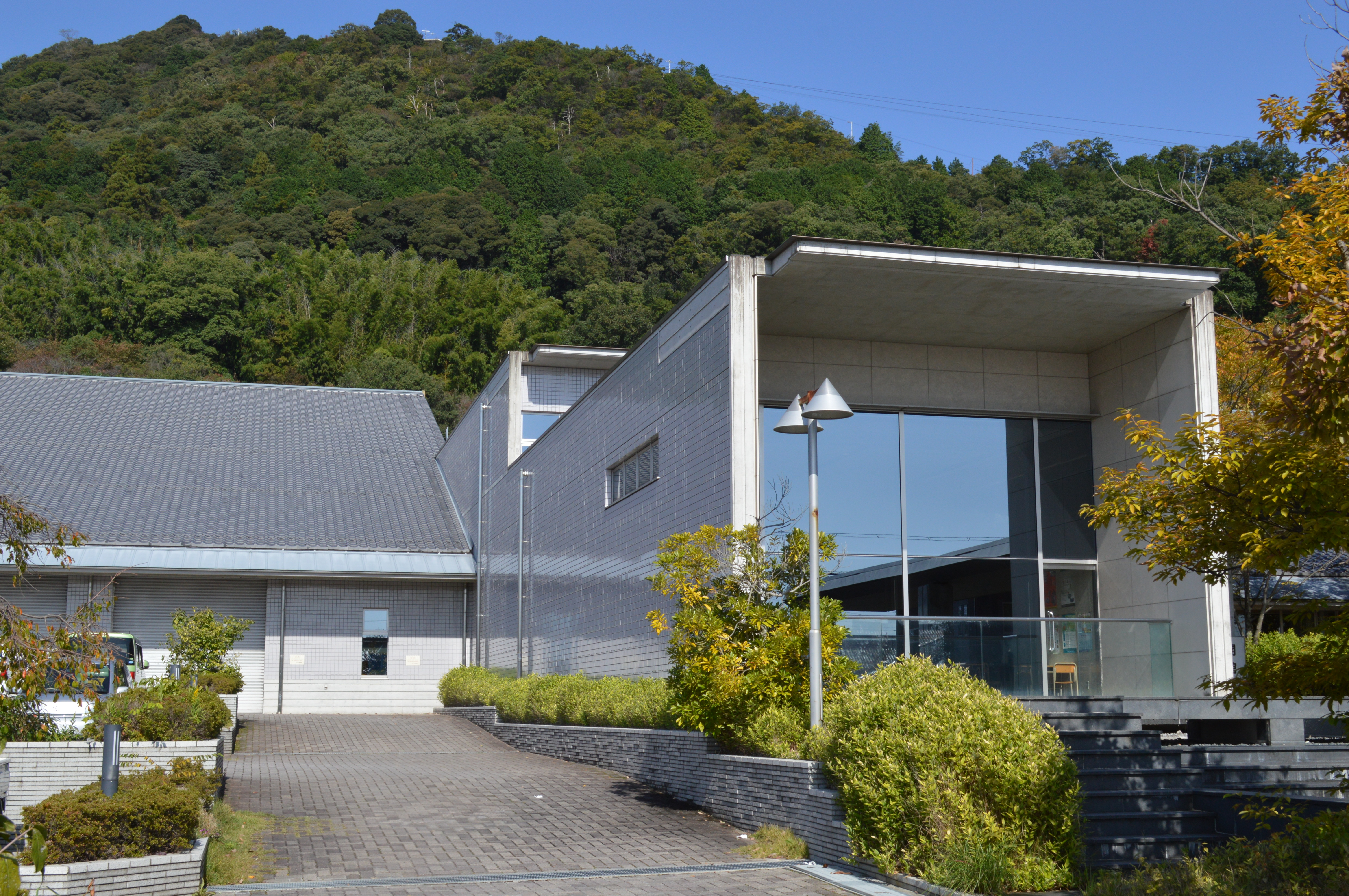 近江八幡市立近江八幡図書館。近江八幡市立図書館のひとつ。